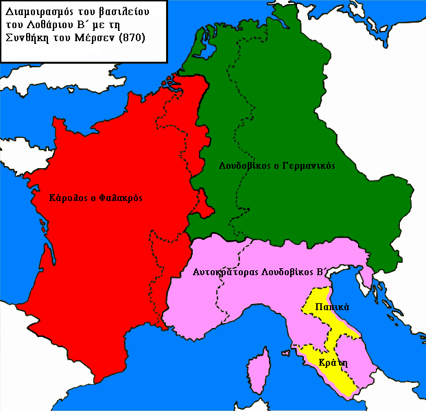 Ο διαχωρισμός του βασιλείου του Λοθάριου Β΄ με τη Συνθήκη του Μέρσεν